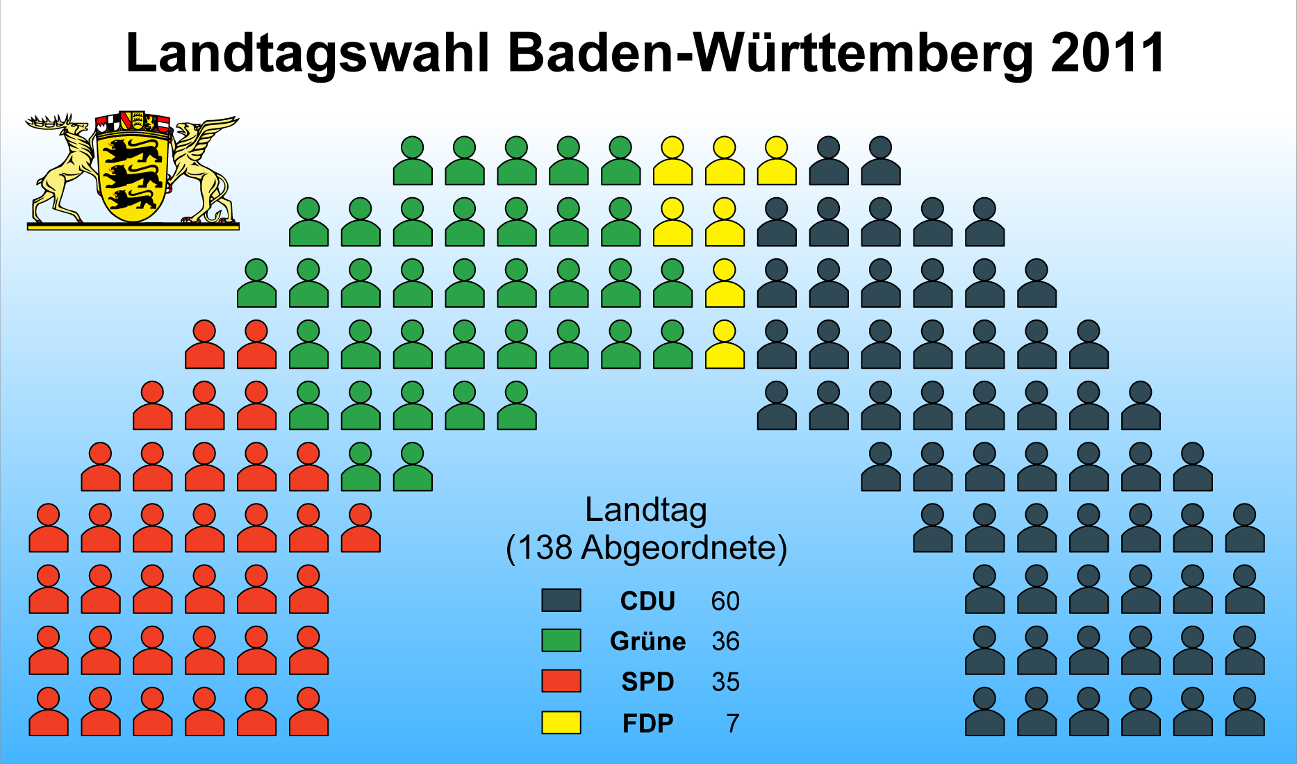 Ergebnis der Landttagswahlen Baden-Württemberg 2011